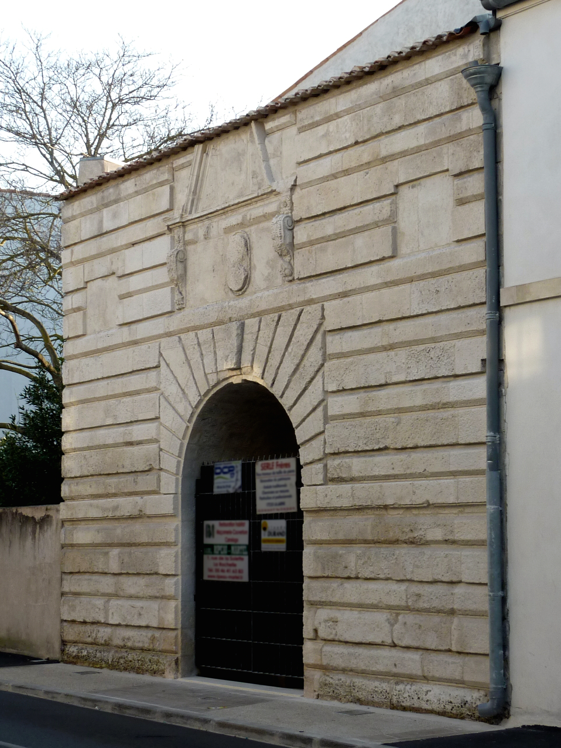 Porte Maubec rue Saint-Louis La Rochelle Charente Maritime France